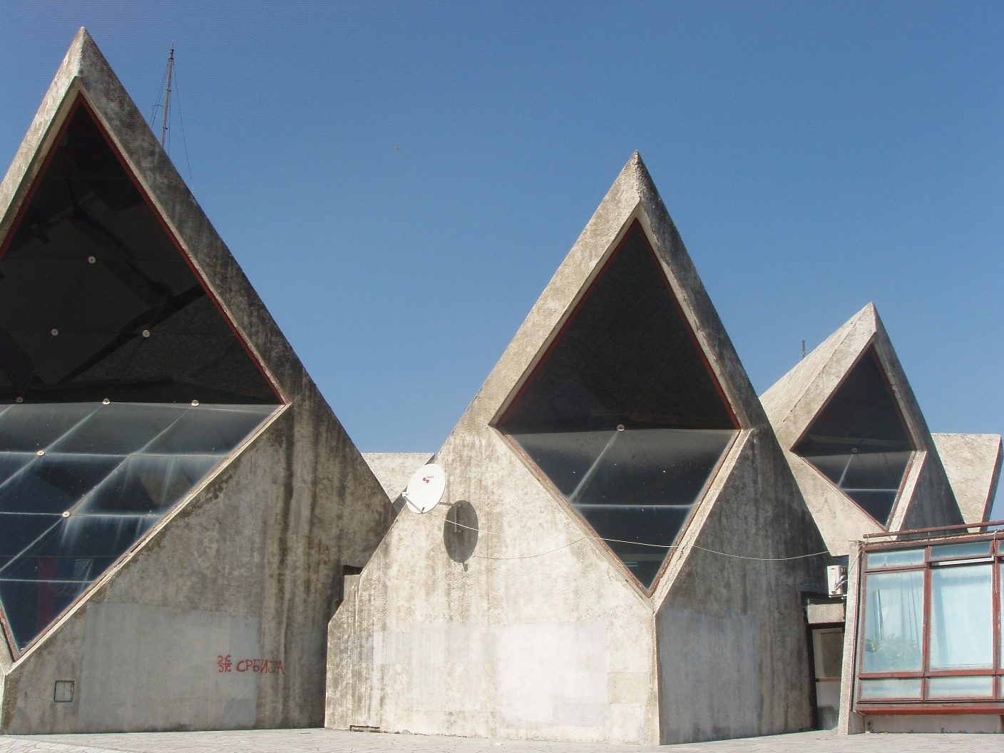 Skupština grada